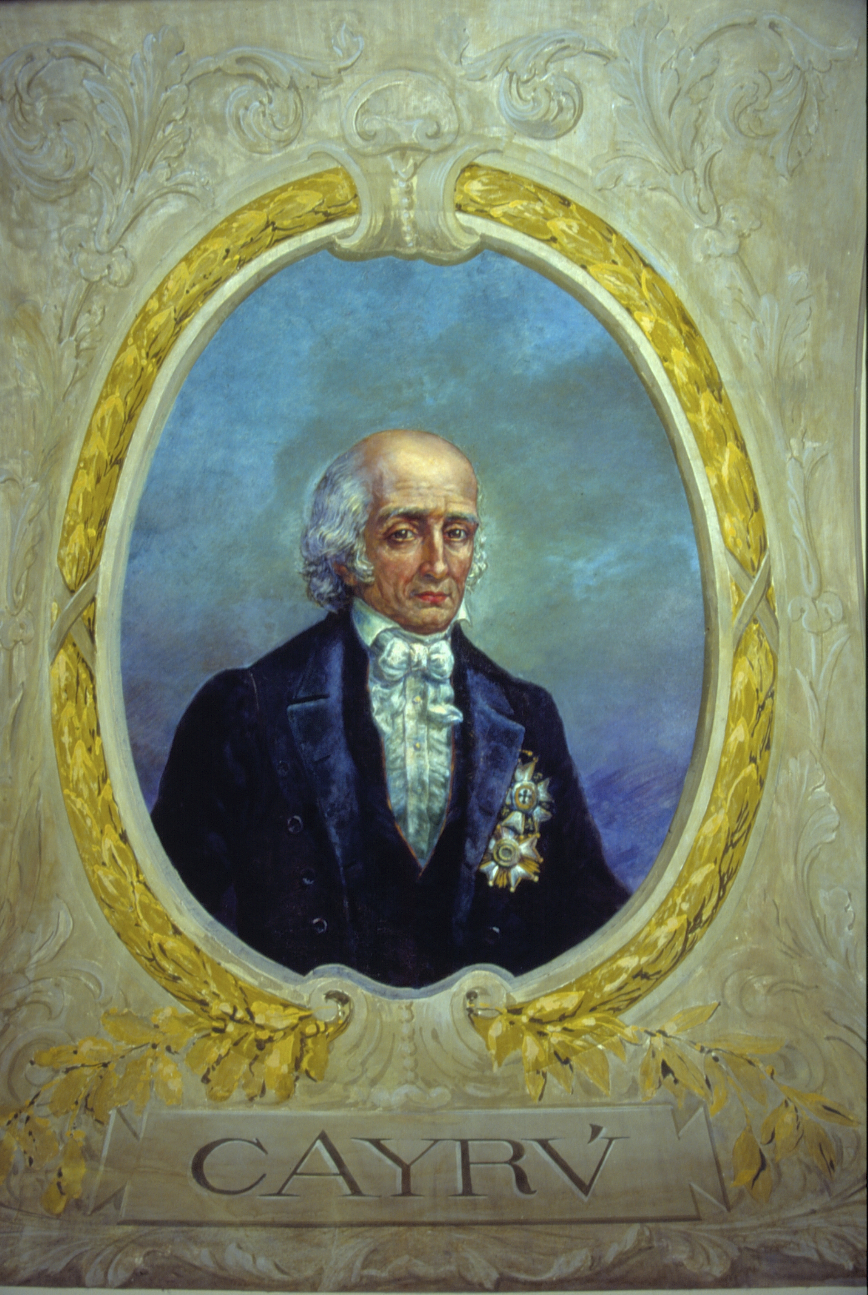 Obra que integra o acervo do Museu Paulista da USP. Coleção Fundo Museu Paulista - FMP